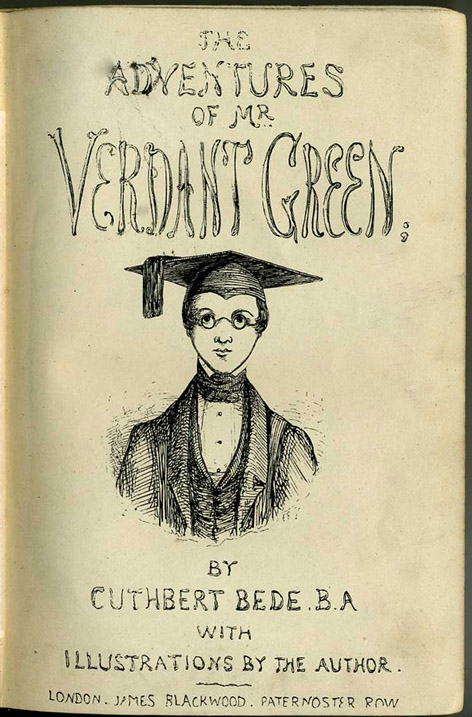 Verdant Green title page